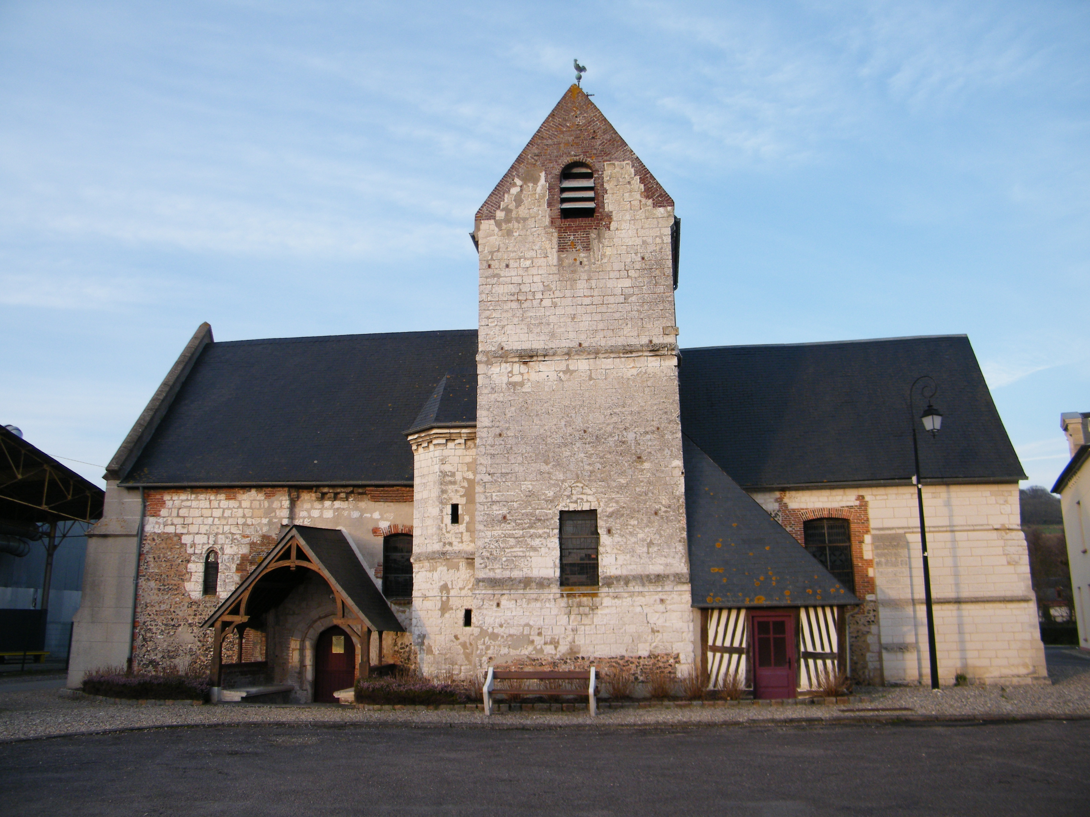 église